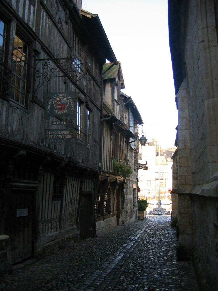 Une rue d'Honfleur, Calvados, Basse-Normandie